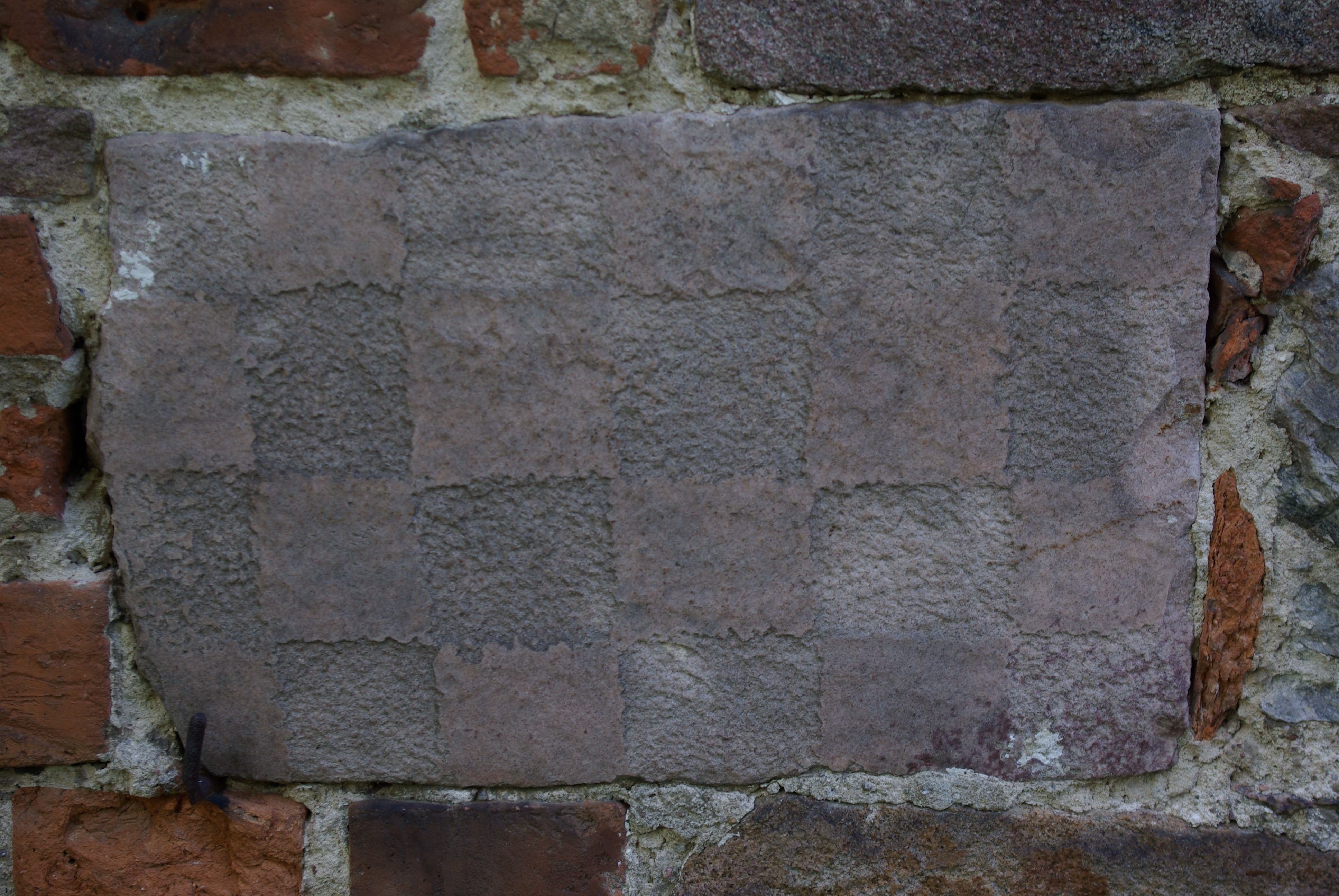 Grossbeeren Ortsteil Kleinbeeren in Brandenburg. Der Schachbrettstein befindet sich an der Südseite der Kirche, die Bedeutung ist unbekannt.